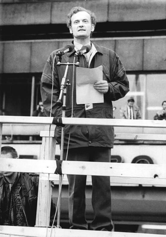 ADN-ZB Link 4.11.89 Berlin: Demonstration 500.000 Bürger beteiligten sich an einer Demonstration für den Inhalt der Artikel 27 und 28 der Verfassung der DDR. Auf dem anschließenden Meeting auf dem Alexanderplatz ergriff auch Pfarrer Friedrich Schorlemmer aus Wittenberg das Wort.